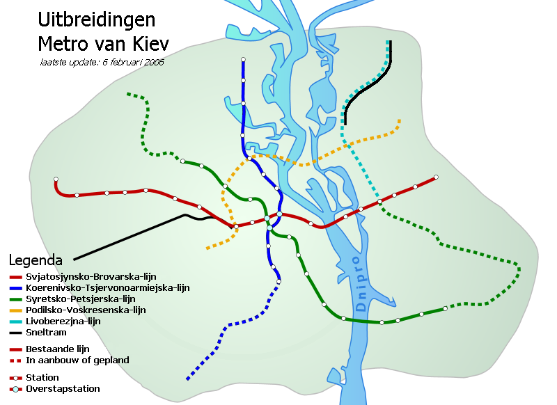 Kaart met in aanbouw zijnde en geplande uitbreidingen van de metro van Kiev